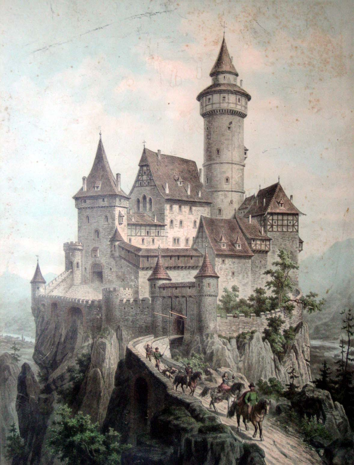 Ritterburg im XIII. Jahrhundert